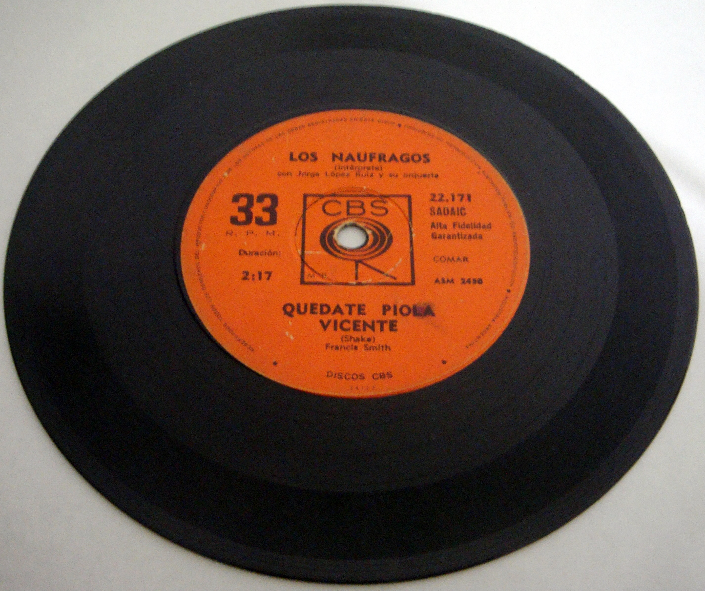 Disco simple de "Los Náufragos". Cara A: Zapatos rotos. Cara B: Quedate piola Vicente.